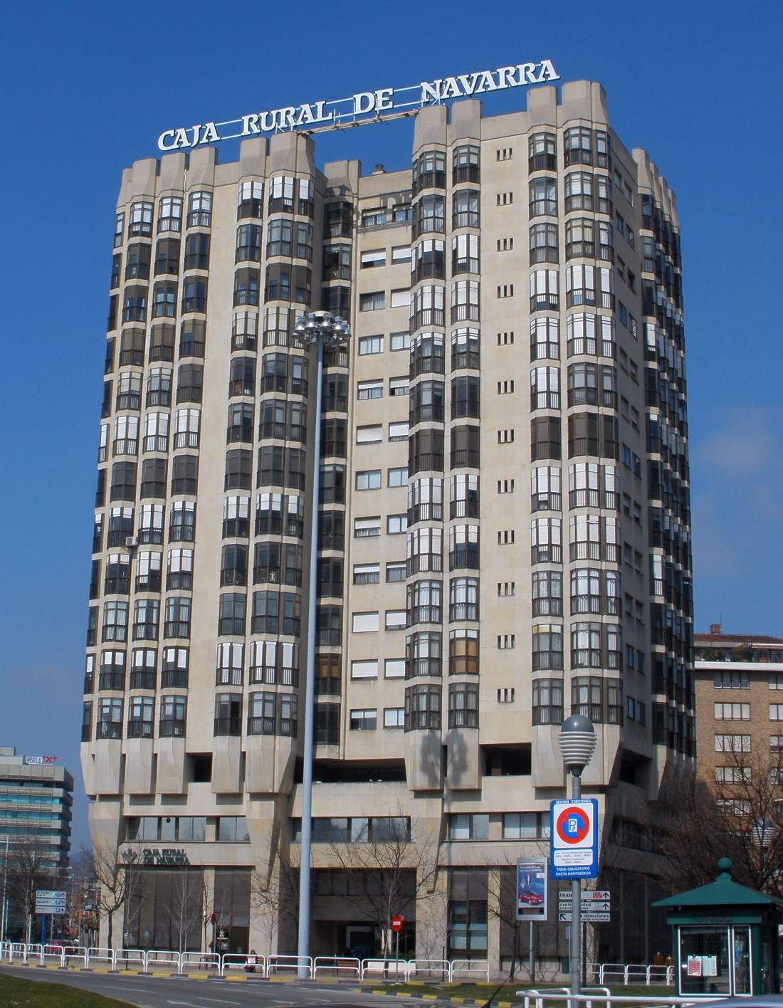 Pamplona - Caja Rural de Navarra